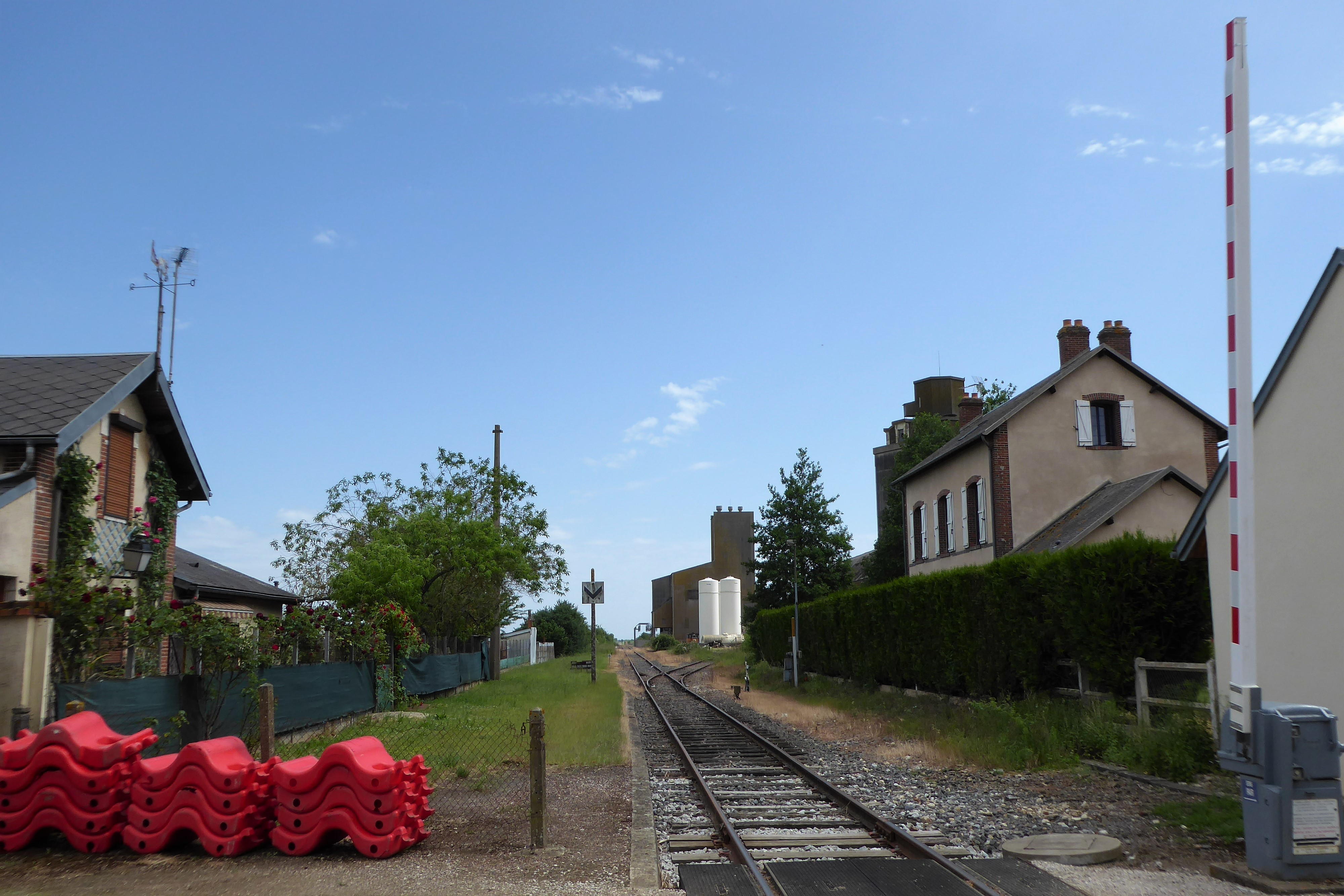 passage à niveau (PN) sur la route départementale 12 (RD12) et gare de fret de Fains-la-Folie sur la ligne de Chartres à Orléans, Eure-et-Loir, France.